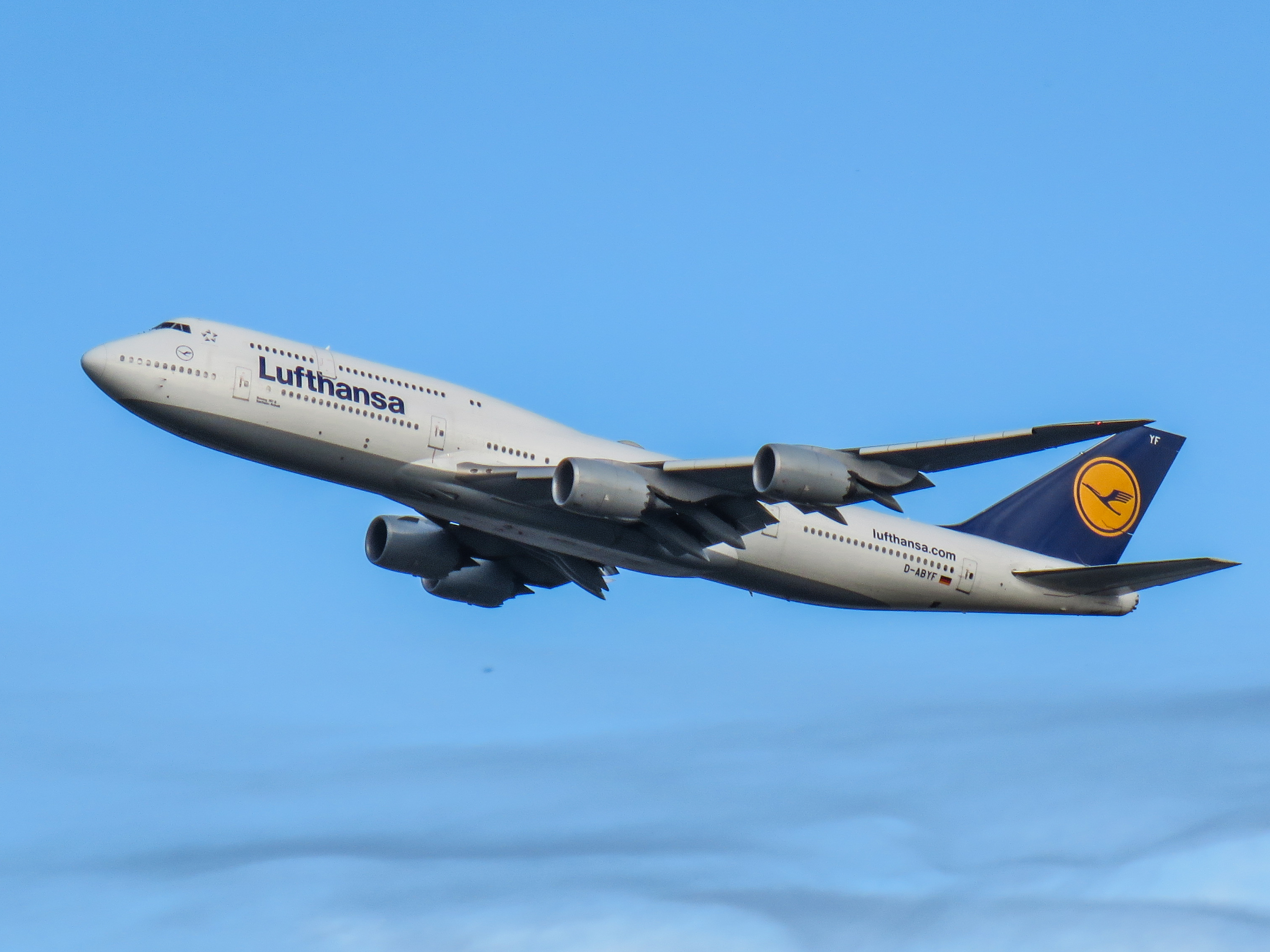 Lufthansa Boeing 747-8 D-ABYF